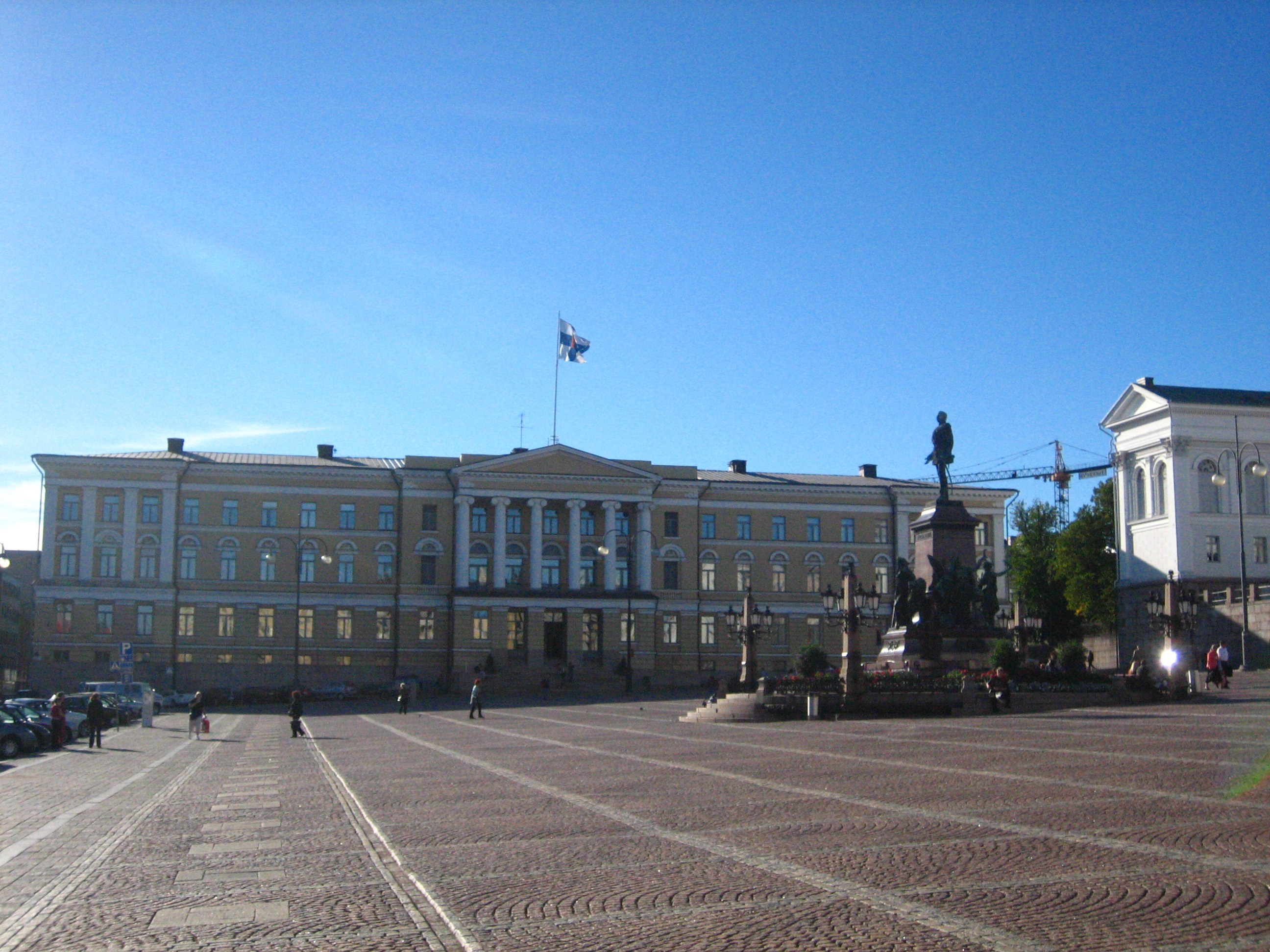 Helsingin yliopiston päärakennus. Itse ottamani kuva.